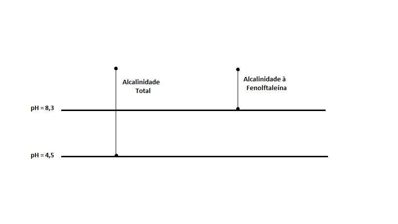 A imagem demonstra os limites de pH utilizados na determinação da alcalinidade em amostra.